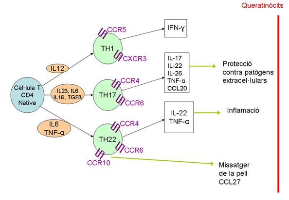 Secreció d'interleucines per part de les cèl·lules T col·laboradores.